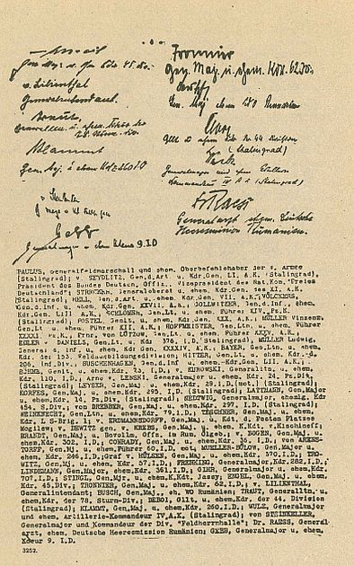 Aufruf der 50. Generale an Volk und Wehrmacht